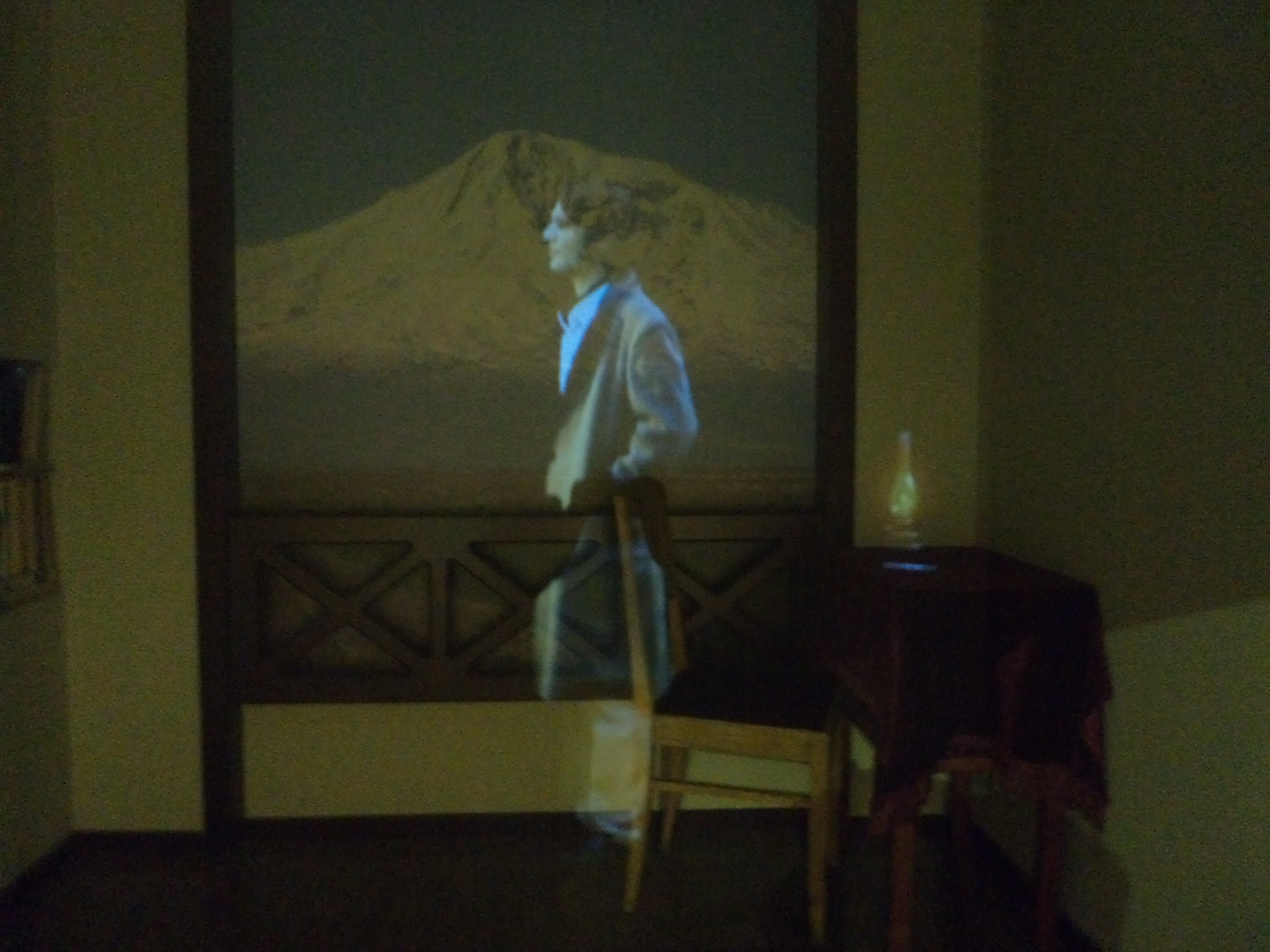 Խաչատուր Աբովյանի անվան հայկական պետական մանկավարժական համալսարանի թանգարան